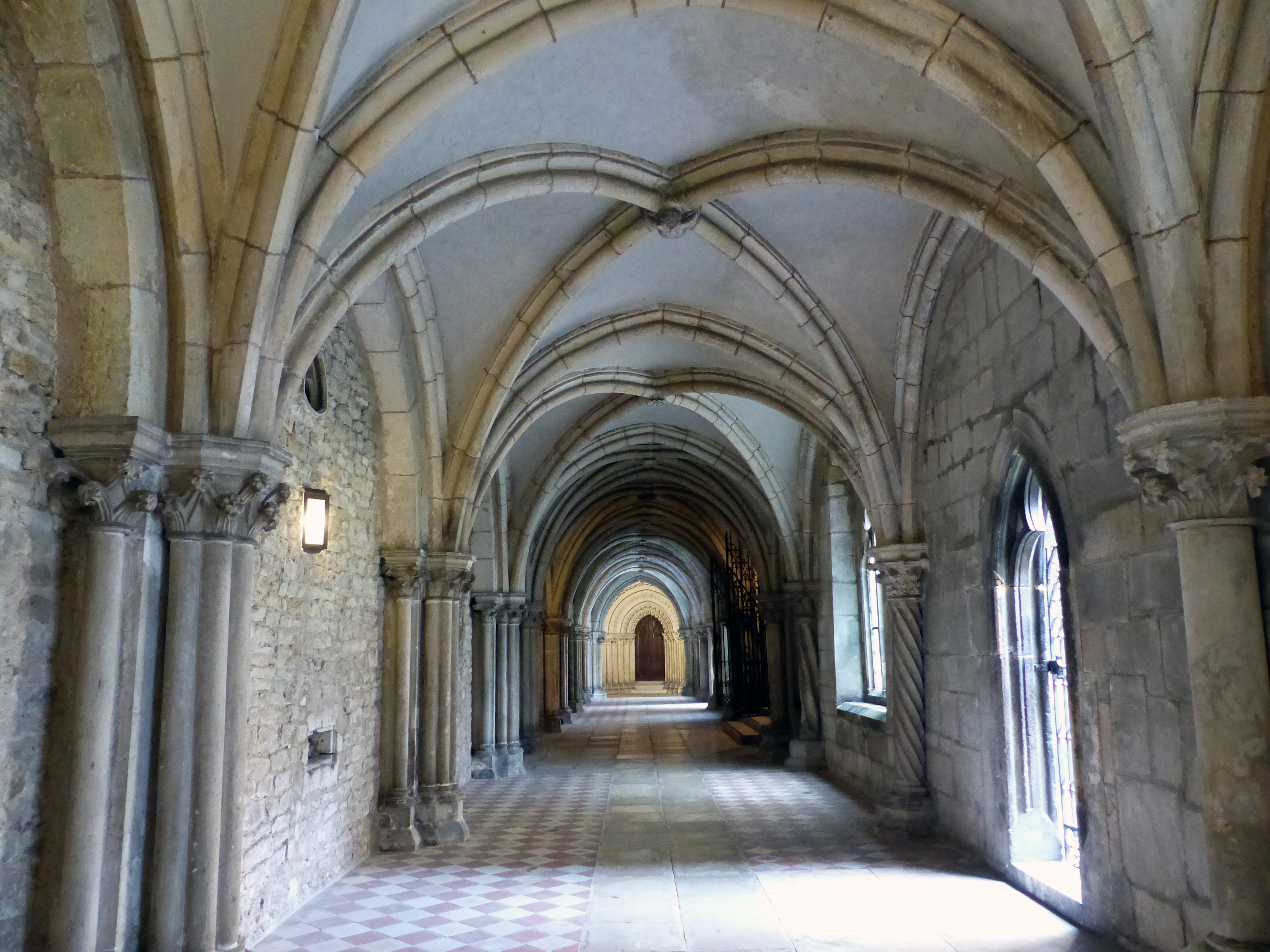 Kreuzgang, Kloster St. Emmeram in RegensburgThis is a photograph of an architectural monument.